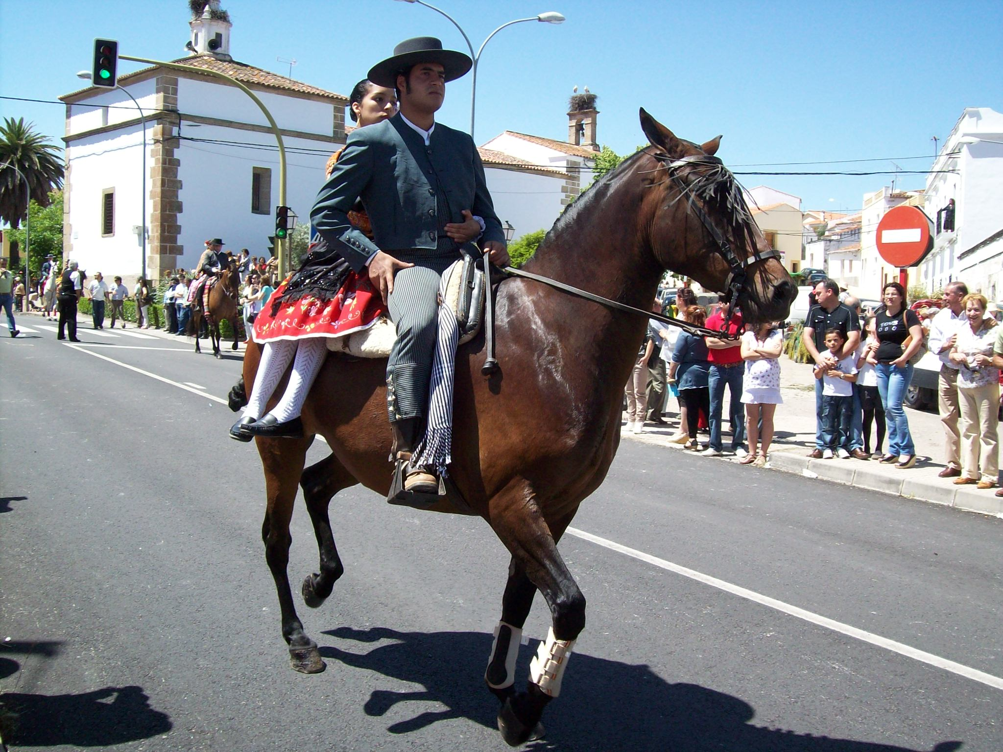 Valencia de Alcantara